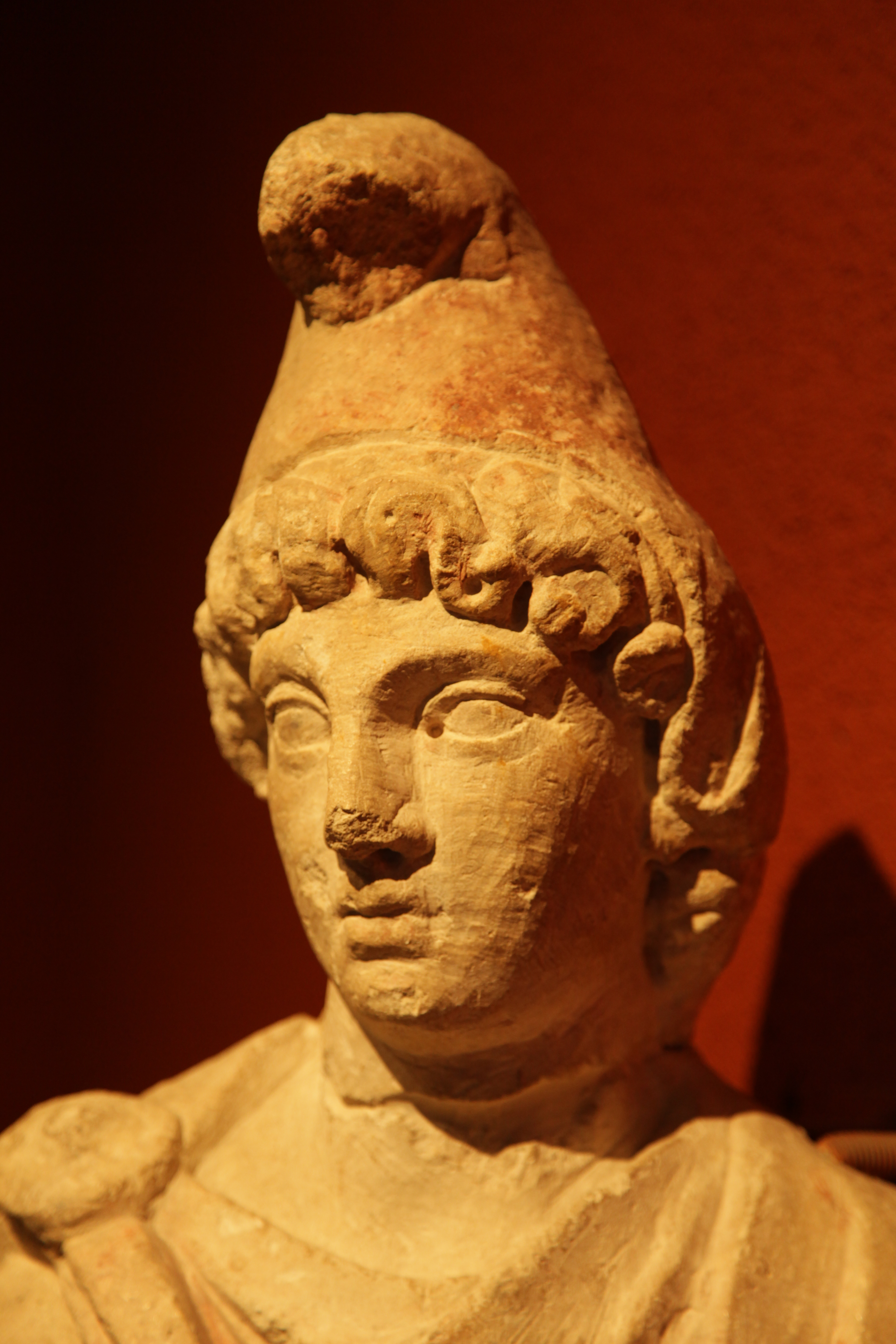 Le parcours permanent. Grâce à la richesse et à la variété de ses collections, le musée d'Aquitaine propose toute l'année dans son parcours de visite de partir à la découverte de l'histoire régionale mais aussi de pays lointains. Préhistoire - Protohistoire - Antiquité - Médiéval - Moderne - Epoque moderne - Le XIXe siècle - Le XXe siècle.